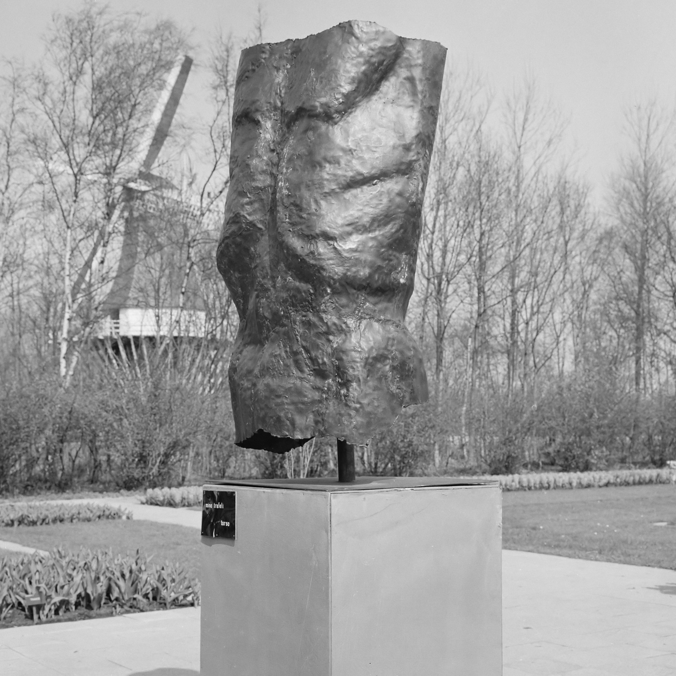 Keukenhof 1964, beeldende kunst, "Torso" Mino Trafeli 20 april 1964